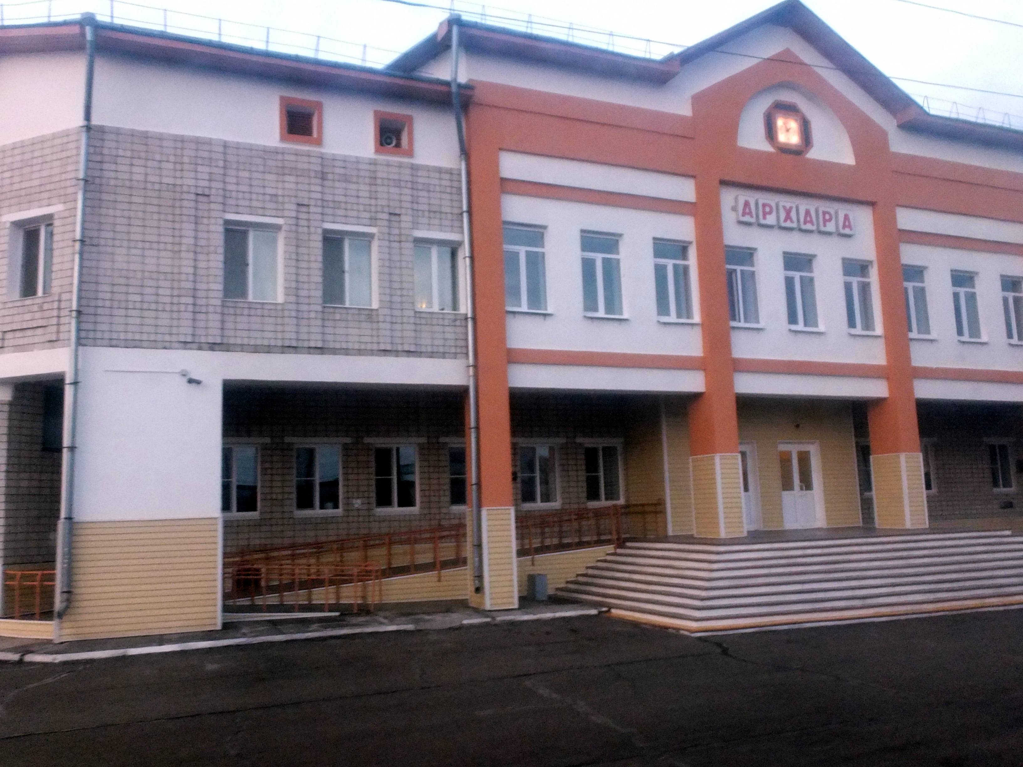 Bahnhof Archara (Streckenkilometer 7866 der Transsibirischen Eisenbahn)